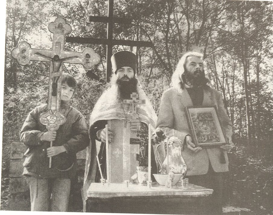 Протоиерей Сергий Иванников